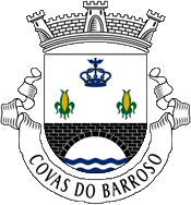 Brasão de Covas do Barroso